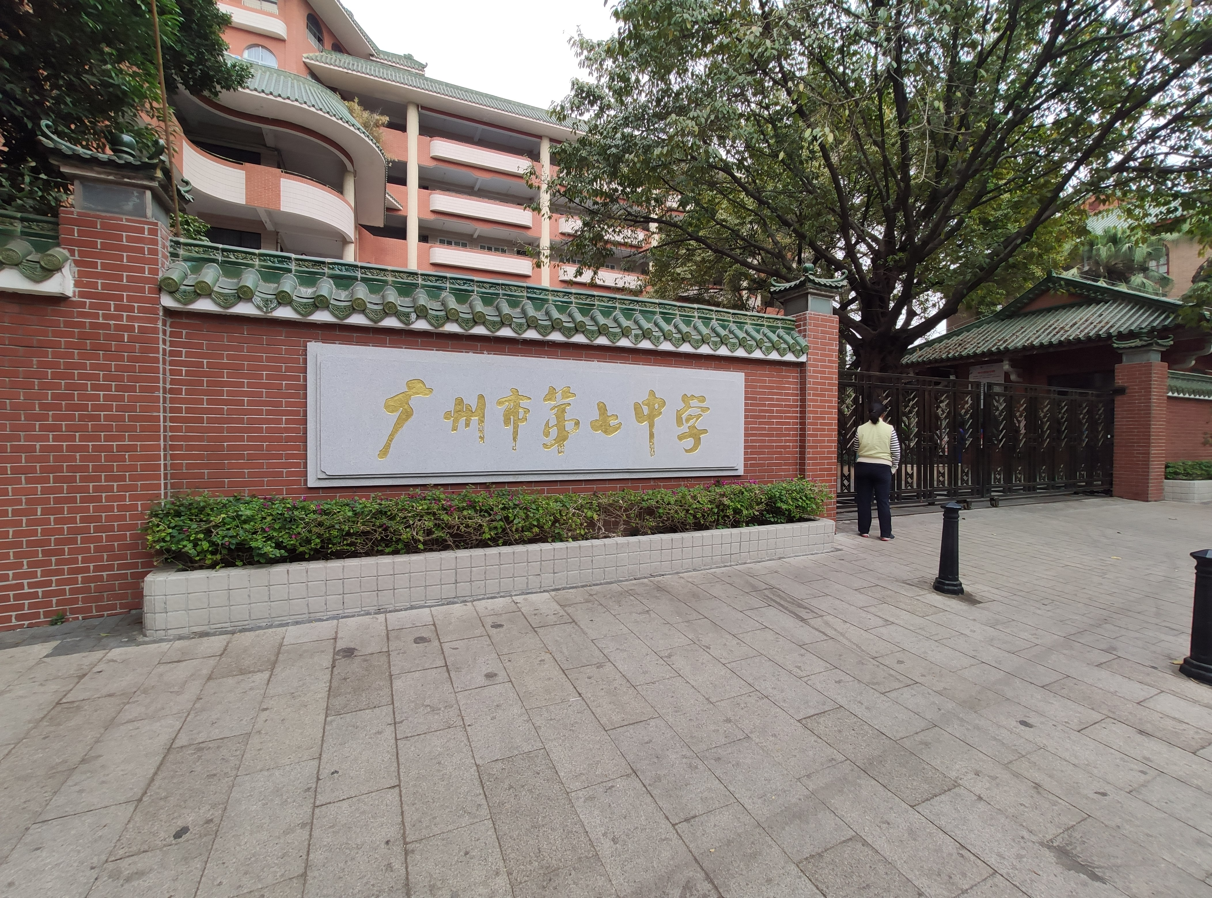 中文（中国大陆）: 广州市第七中学高中部正门